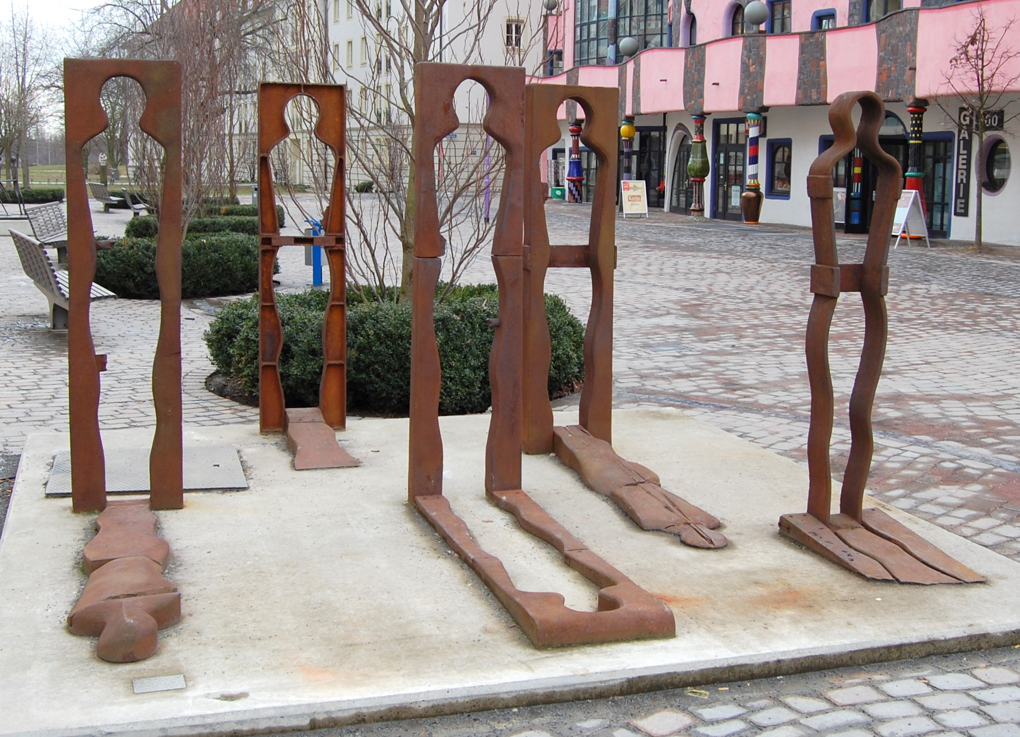 Skulptur "Endzeit" in Magdeburg, geschaffen von Helmut Lander, 1983